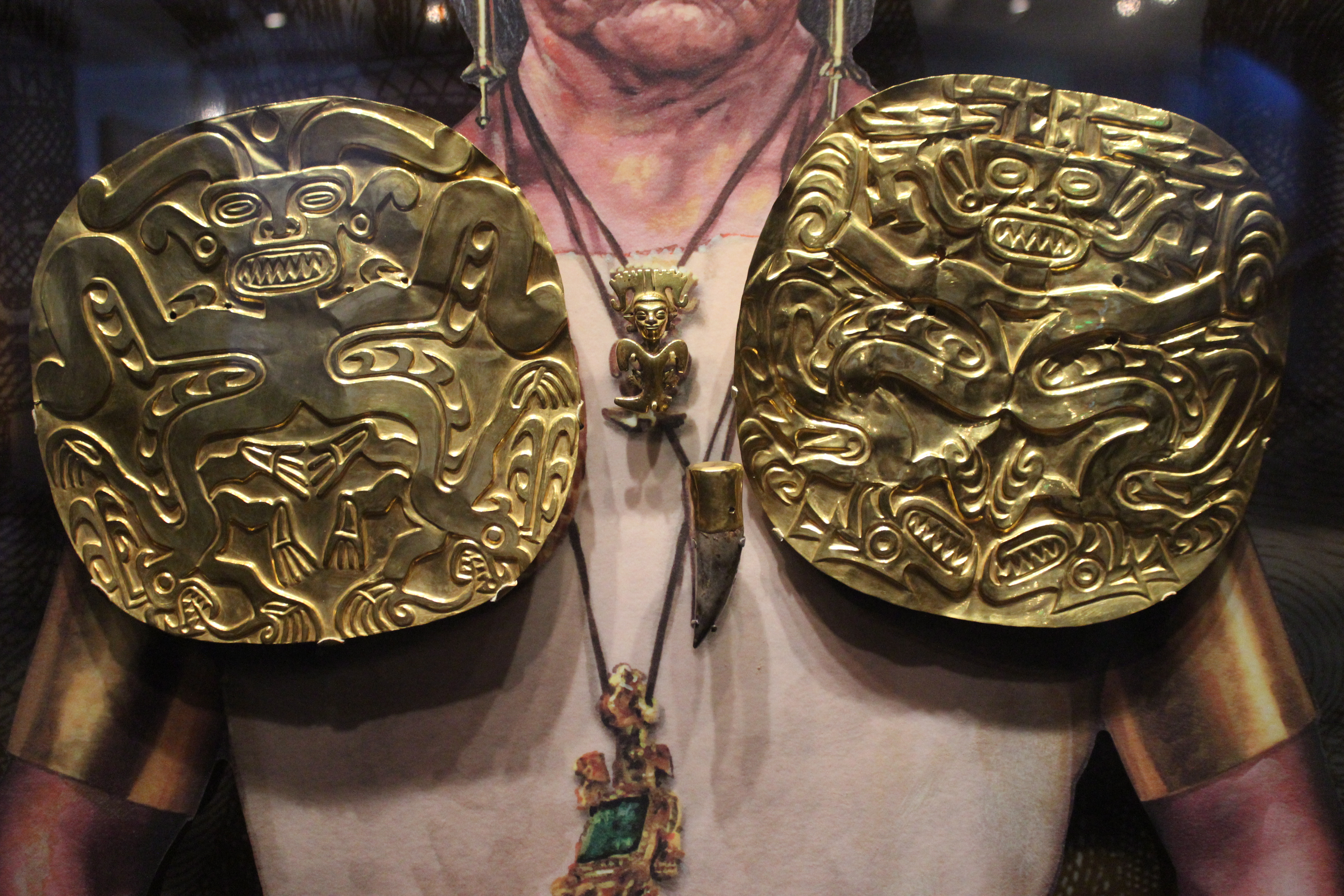 Penn University Museum. Tesoro de Sitio Conte (Panamá).